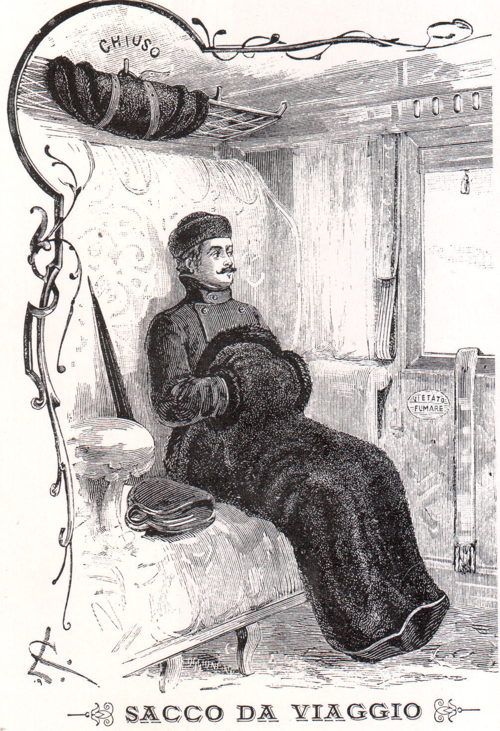 Aus einer italienischen Anzeige: Mann in der Eisenbahn im Fußsack mit Muff (eventuell angearbeitet), an der Gepäckablage der Fußsack zusammengerollt.